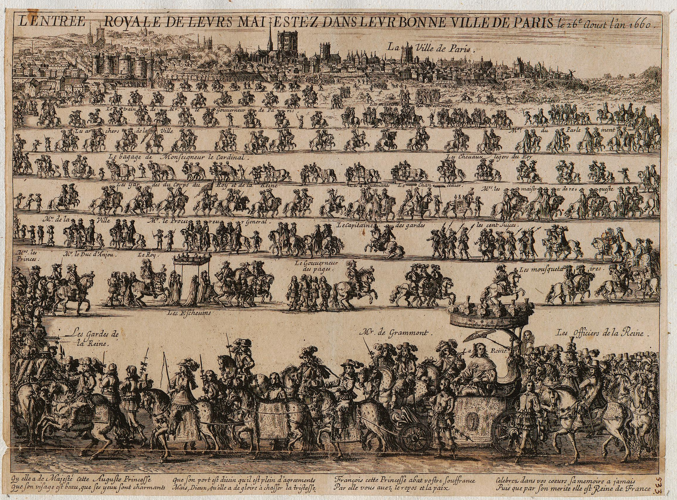 Grafik aus dem Klebeband Nr. 15 der Fürstlich Waldeckschen Hofbibliothek Arolsen Motiv: "L'entrée Royale de leurs maiestez dans leur bonne ville de Paris le 26e Aoust l'an 1660" Einzug Ludwig XIV. und seiner Ehefrau Maria Theresia von Österreich in Paris, 26. August 1660Engraving showing the 1660 entry of Marie Thérèse of Austria (new wife of Louis XIV) into Paris.